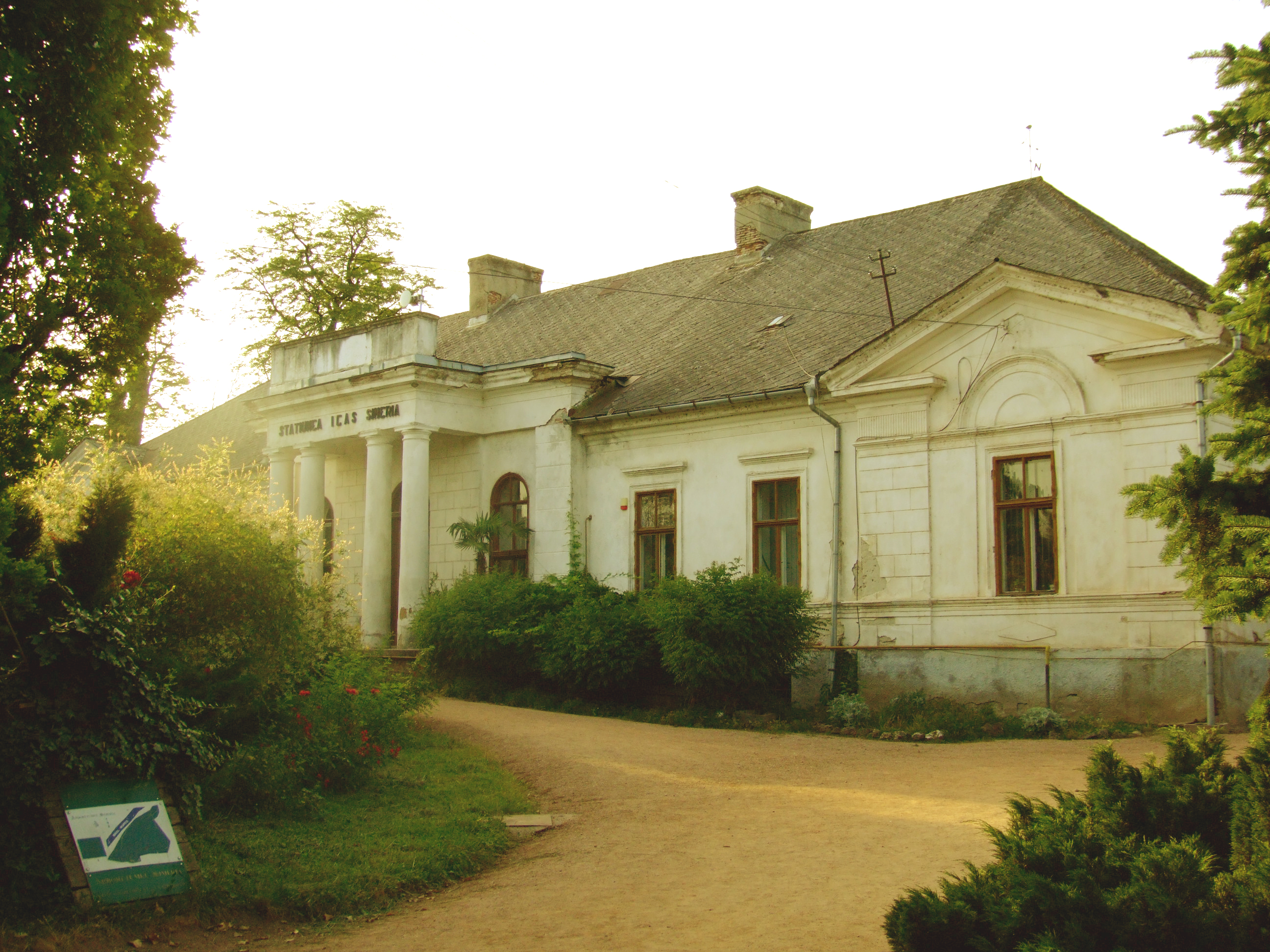 Parc Dendrologic a lui Bela Fay Simeria , Judetul Hunedoara. 02